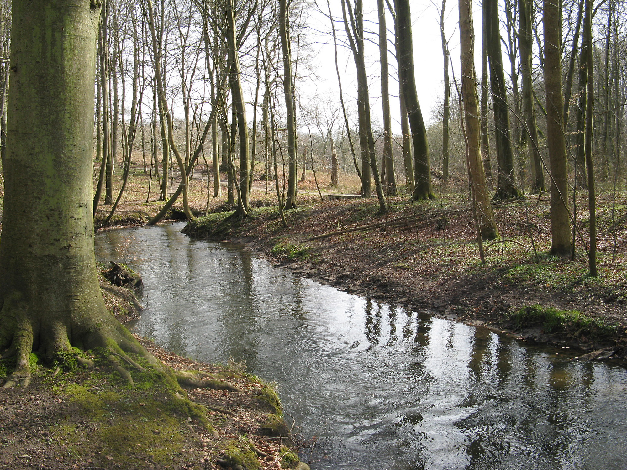 Giber Aa i Moesgaard Skov syd for Aarhus